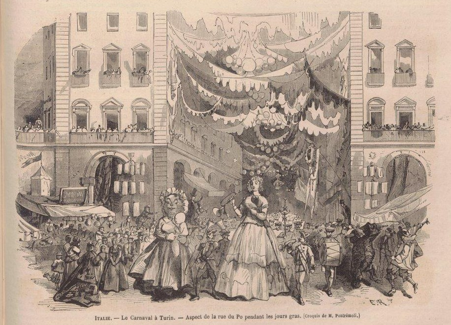 Le Carnaval de Turin 1866 via Po.